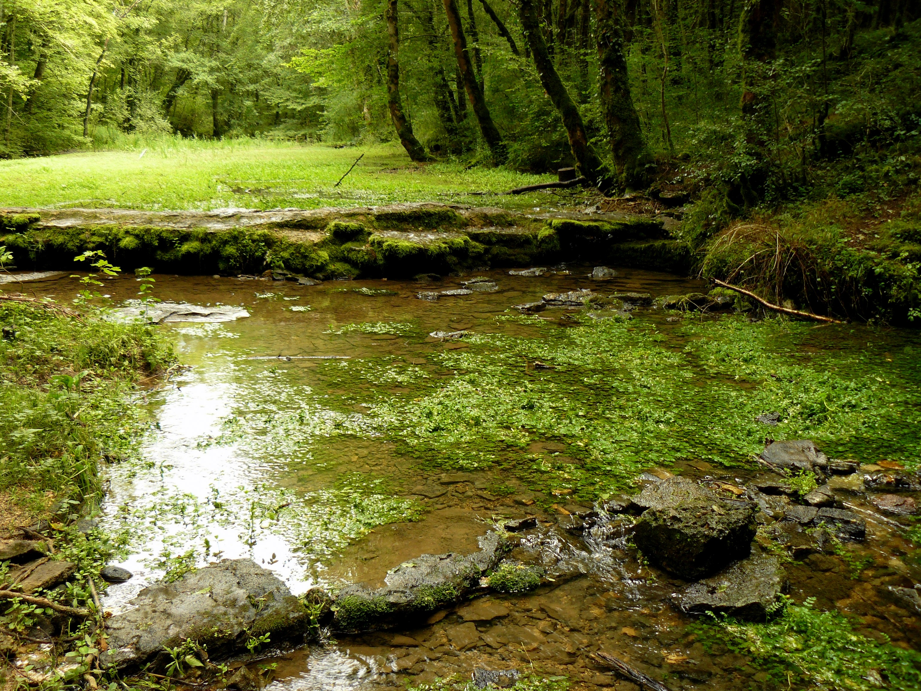 Source de l'Aube, dans la forêt d'Auberive, près de Praslay (Haute-Marne, France)